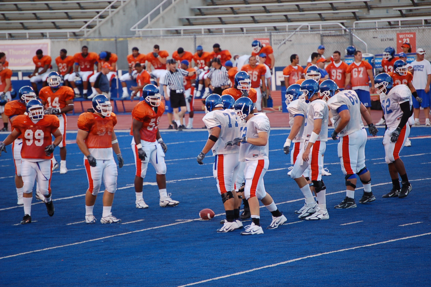 Boise State broncos scrimmage